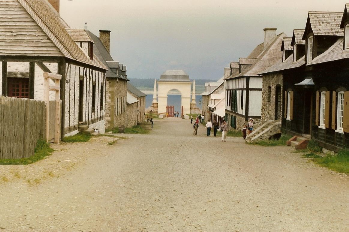 Rue Principale de Louisbourg